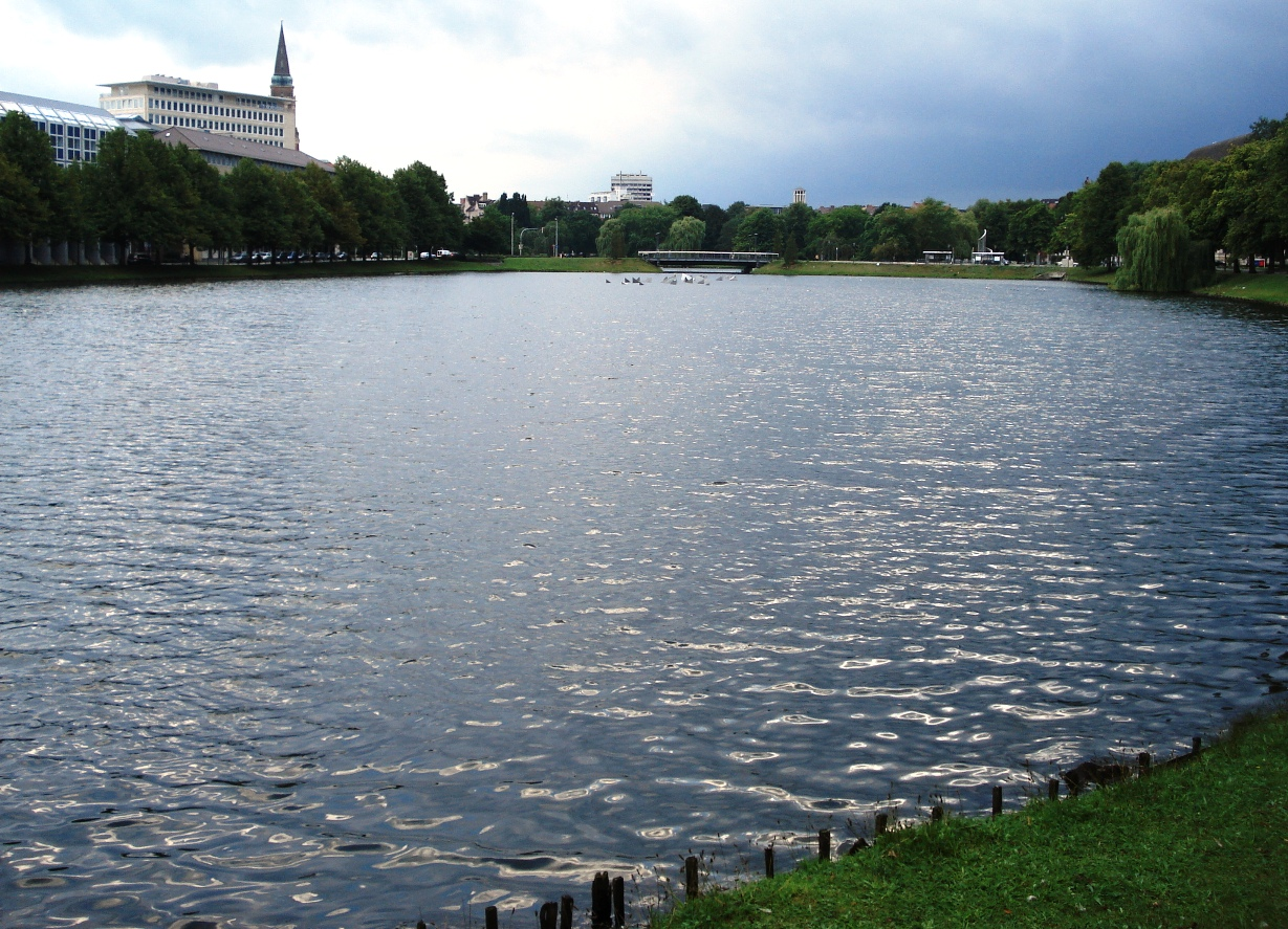 Der Kleine Kiel - Nord